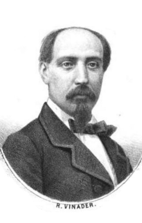 Político carlista